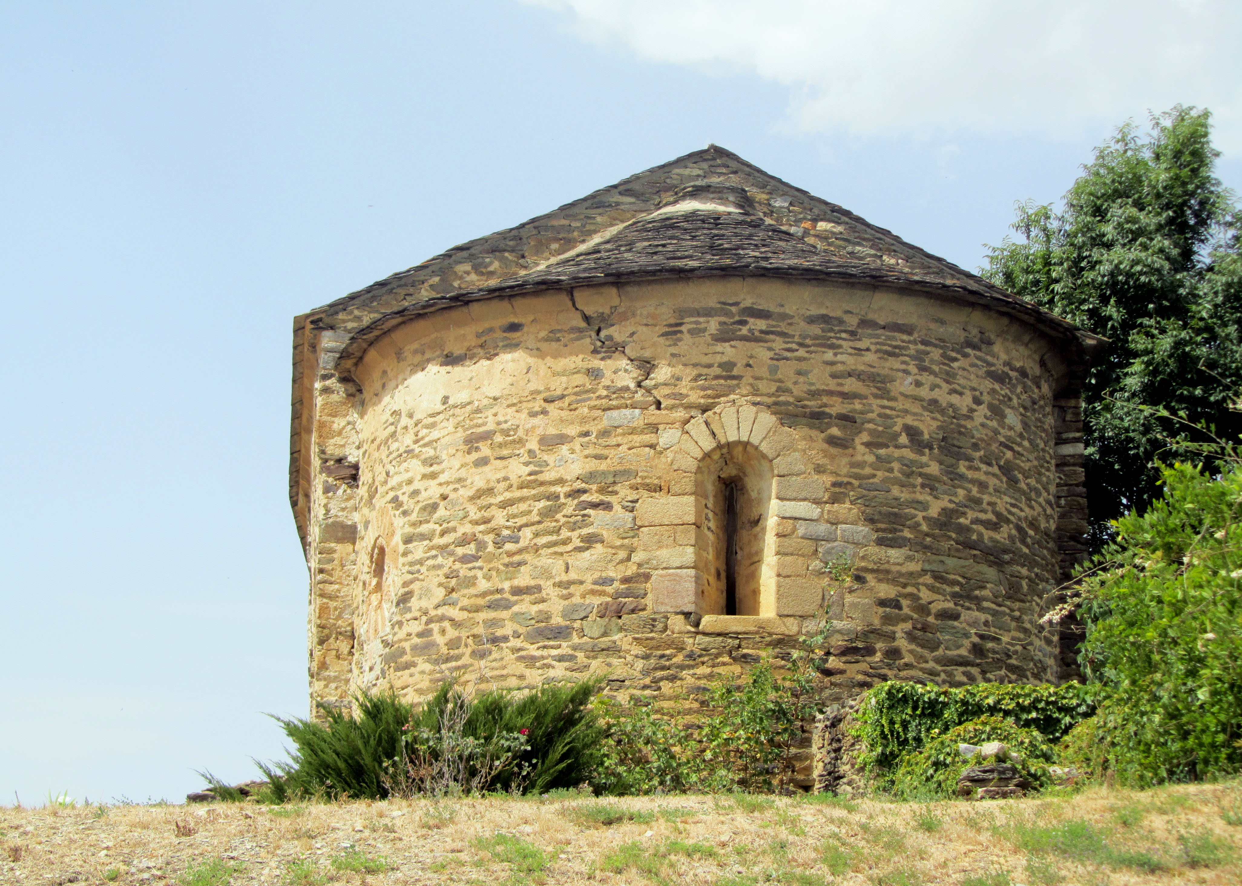 Iglesia de Santa Eugenia de Saga de estilo románica, en la Baixa Cerdanya Cataluña.